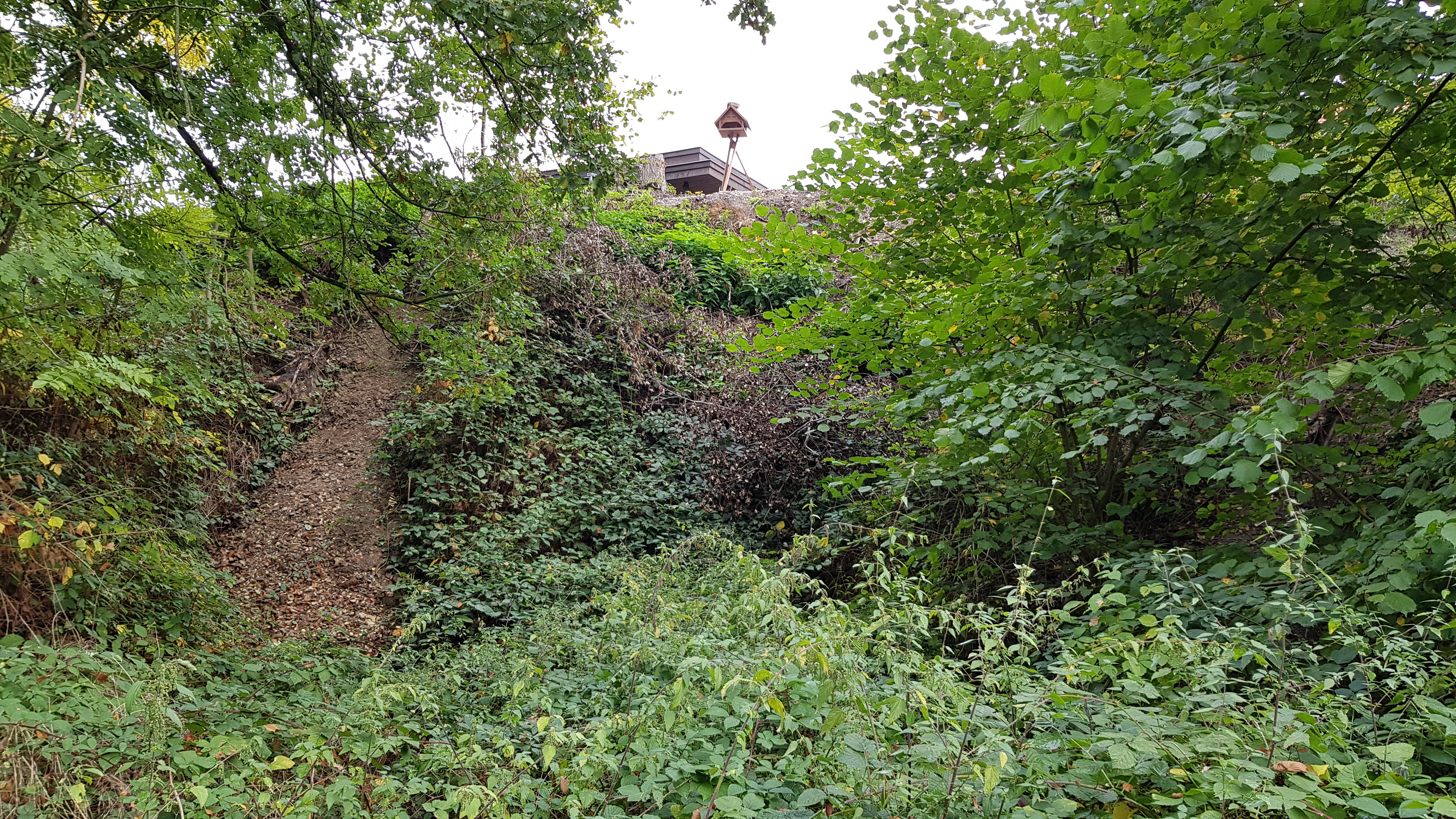 Groeve Crapoel, Crapoel, Gulpen-Wittem, Nederland